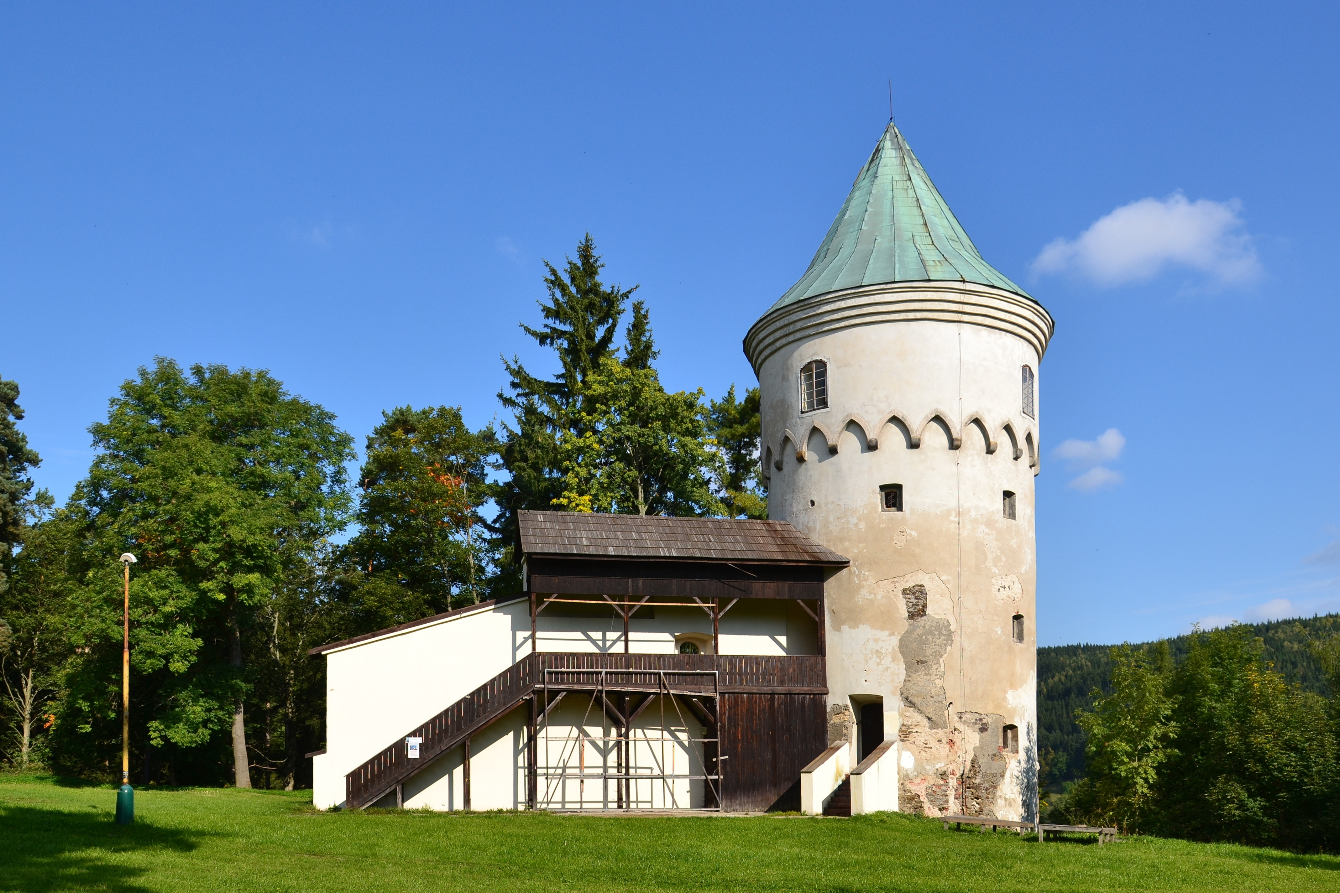 Freudenstein, Hradiště 53, nad severozápadním okrajem města, při silnici, též ZSJ 0564560 Nové Město, Jáchymov, Jáchymov.